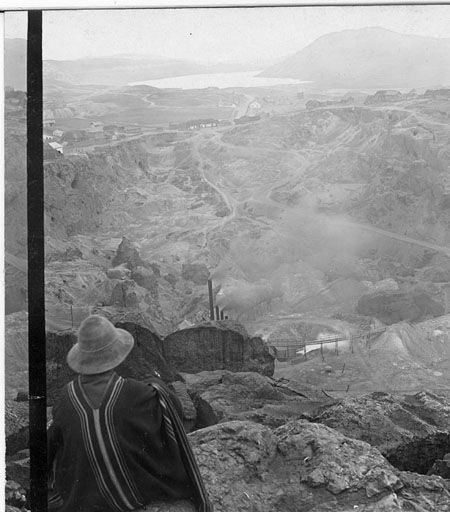 Mina, hoy tajo abierto; y laguna de Quiulacocha a principios del s. XX.